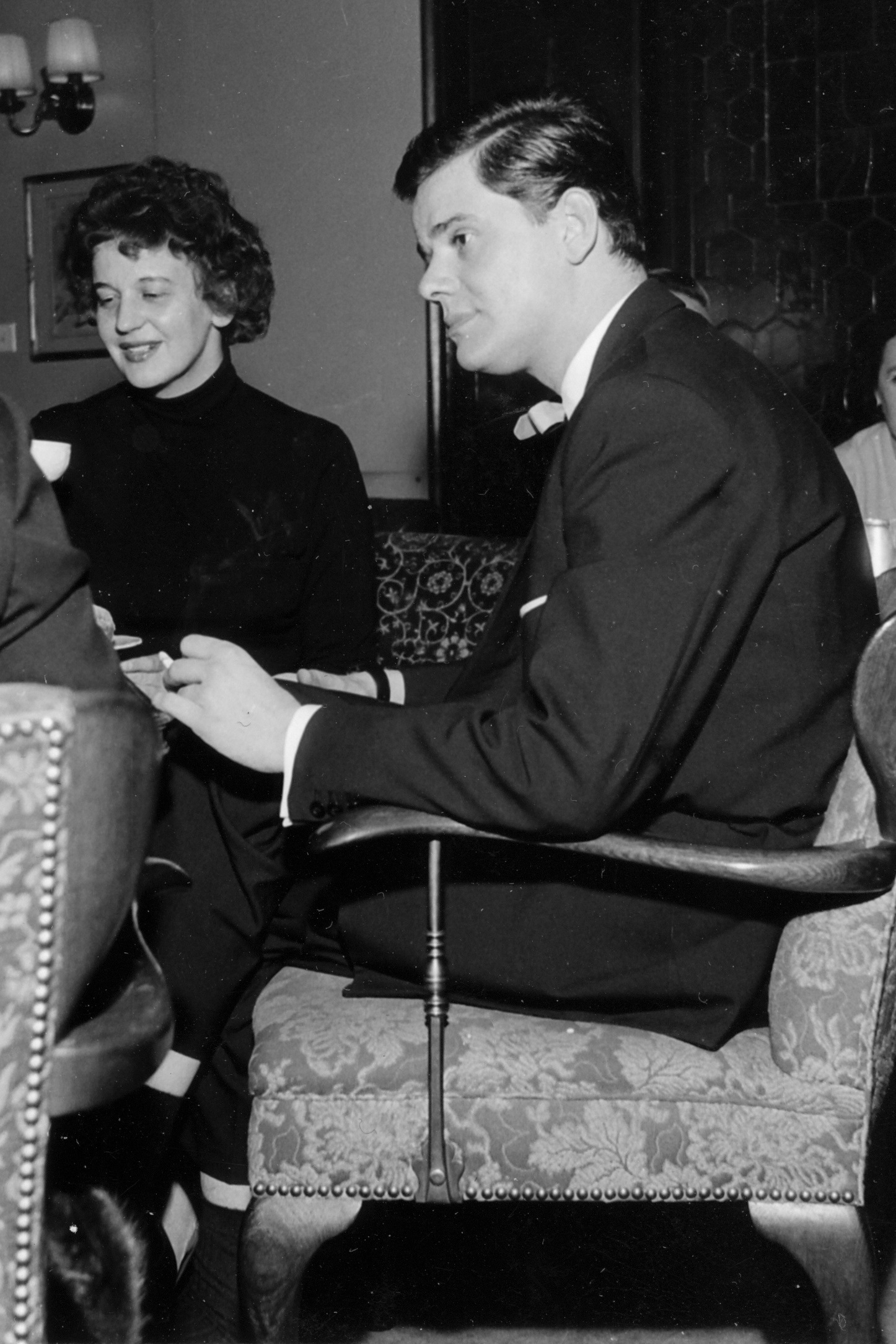 Der Schauspieler Walter Giller bei einer Veranstaltung in Frankfurt am Main anlässlich des Films "Musik, Musik und nur Musik"